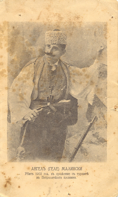 Портрет на Ангел Малински.